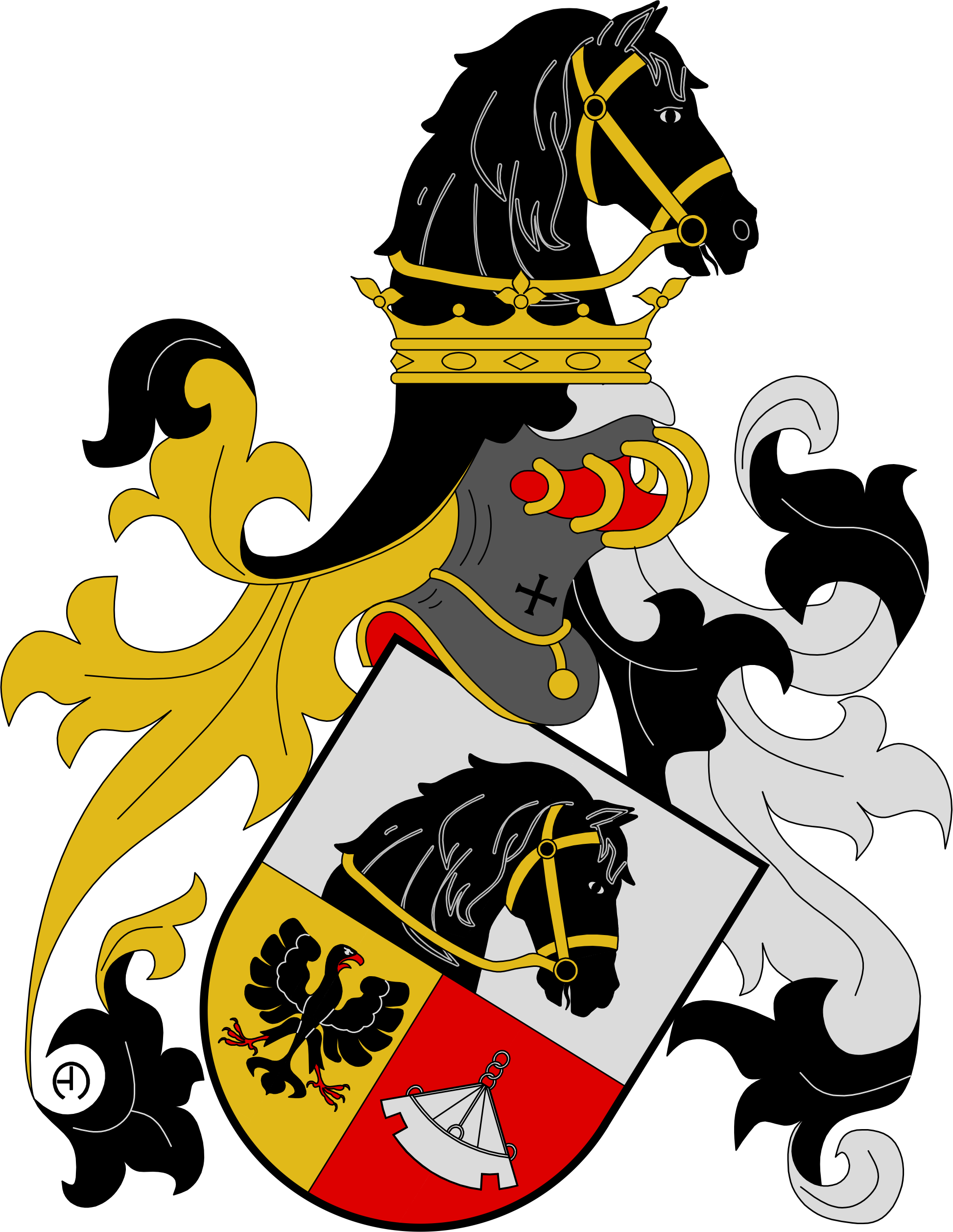 Erb rodu Sturz